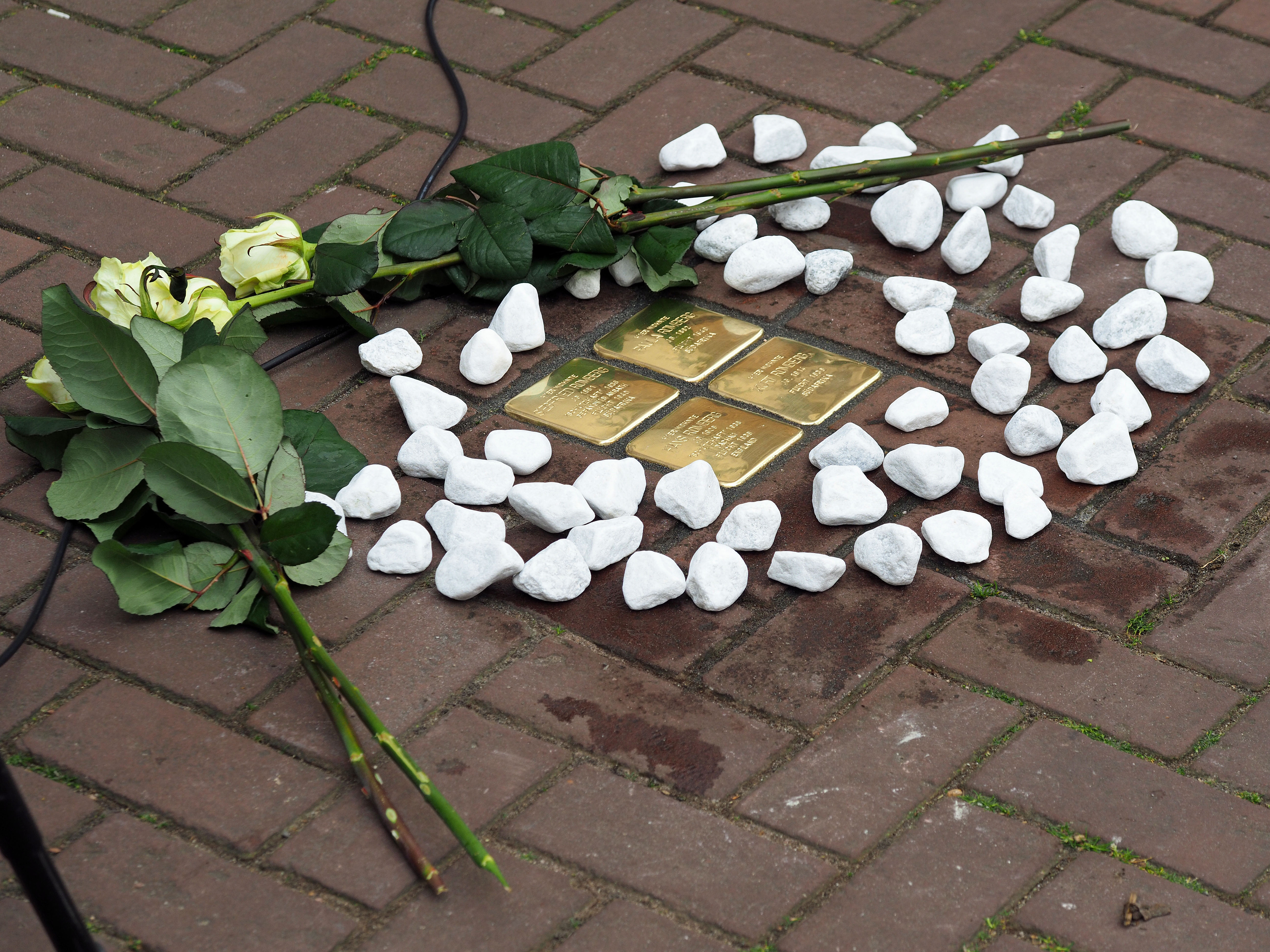 Stolpersteinverlegung Tönisvorst Kaiserstraße (25.05.2019)